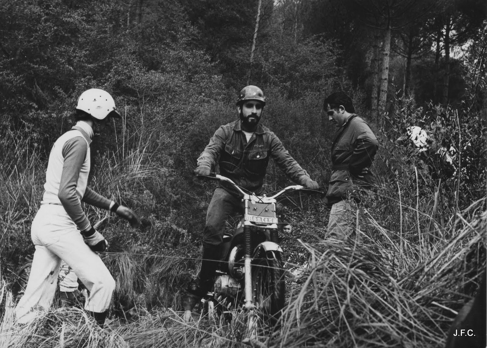 En Joan Font, sobre la seva Cota 172 durant uns entrenaments amb la colla del Moto Club Cingles l’octubre del 1975. A la seva esquerra el President del Club, l'Ildefons Vilanova, observa les seves evolucions.